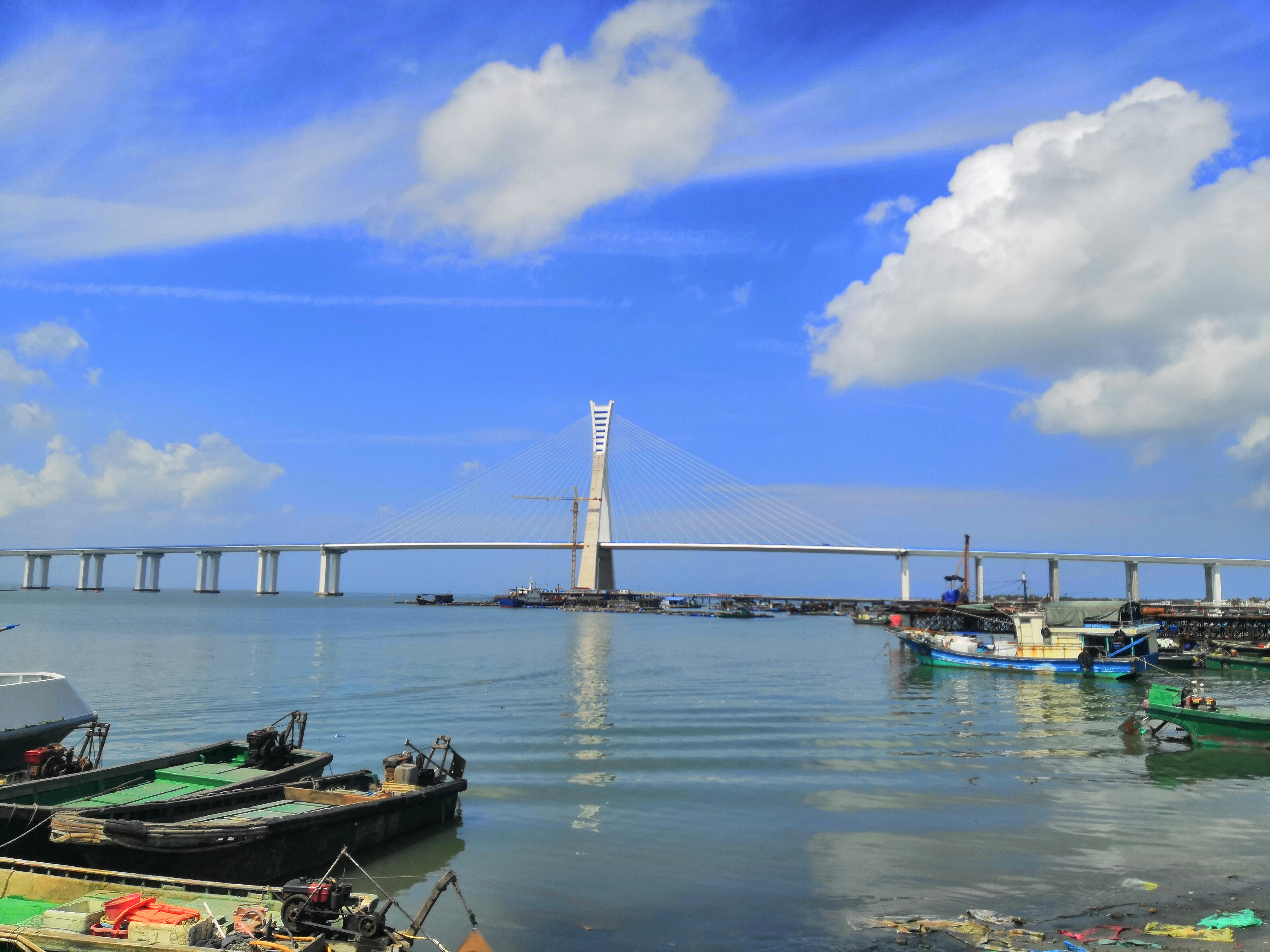 铺前大桥。